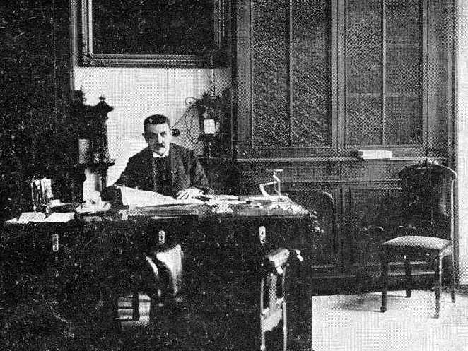 Pedro Pais Lapido, fotografía en Vida Gallega 1909